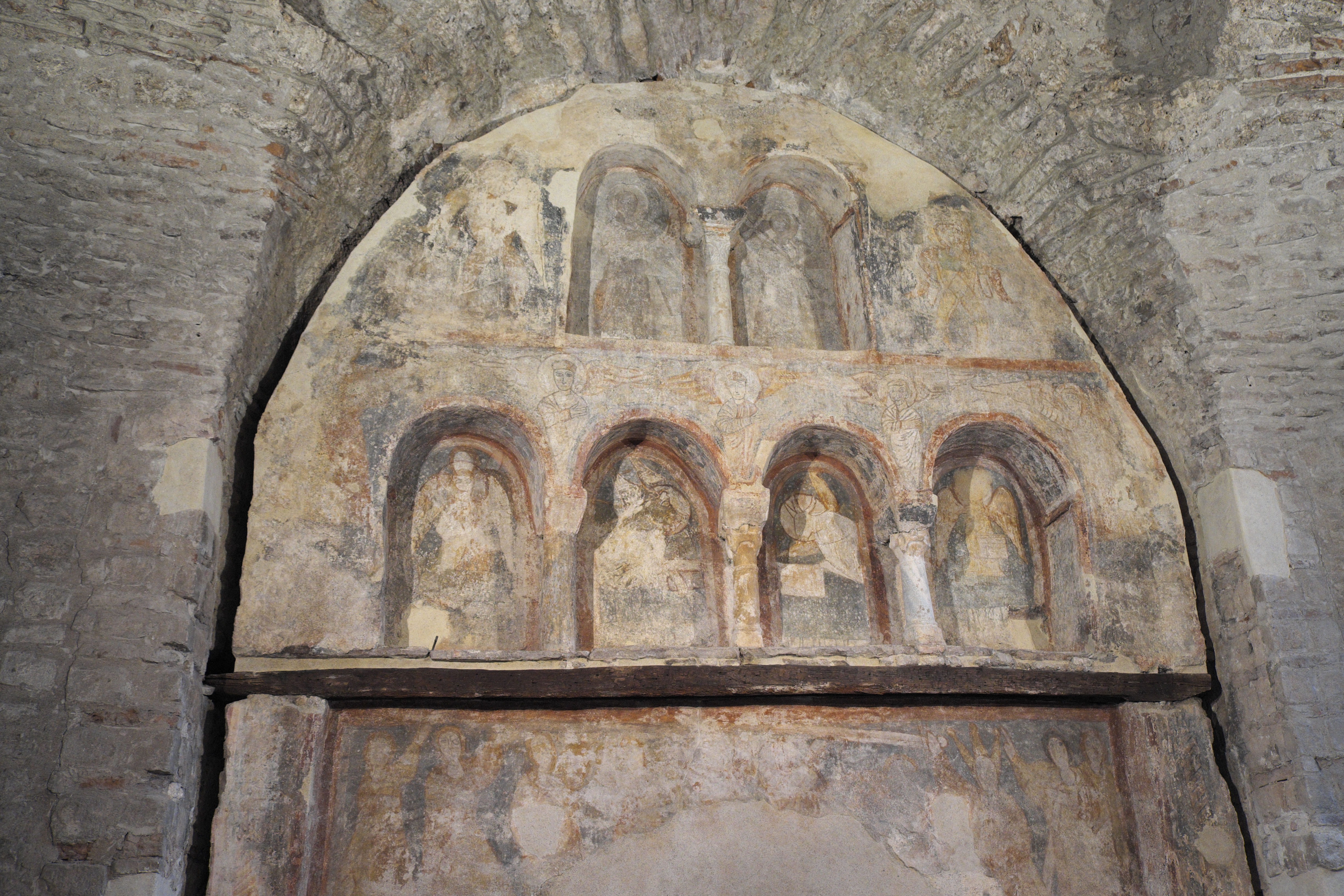 Kirche Sant Pere (Conjunto monumental de Egara) in Terrassa in der Provinz Barcelona (Katalonien/Spanien), Hauptapsis mit Blendarkaden und Wandmalerei